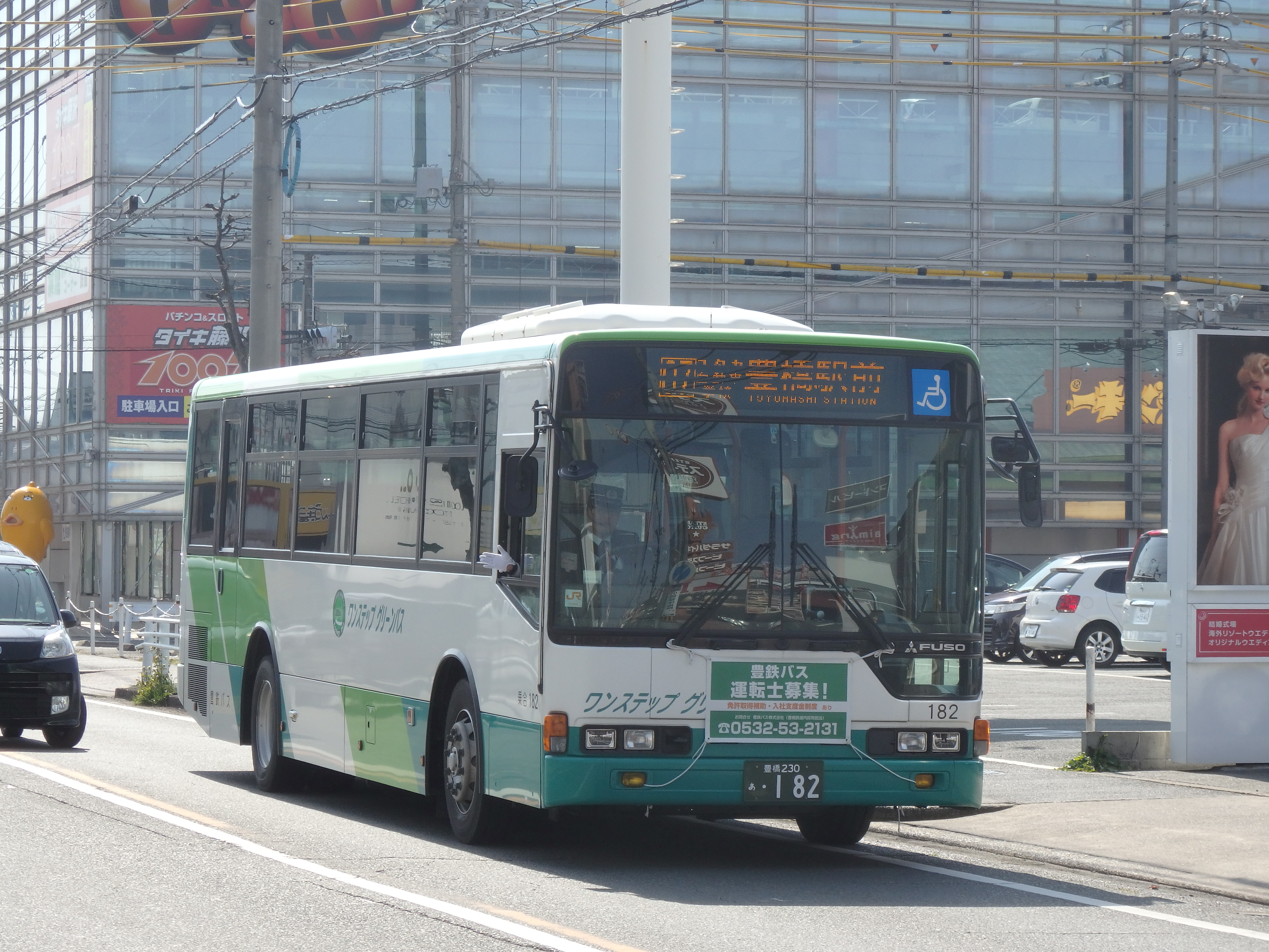 豊鉄バス豊橋営業所所管中浜大崎線